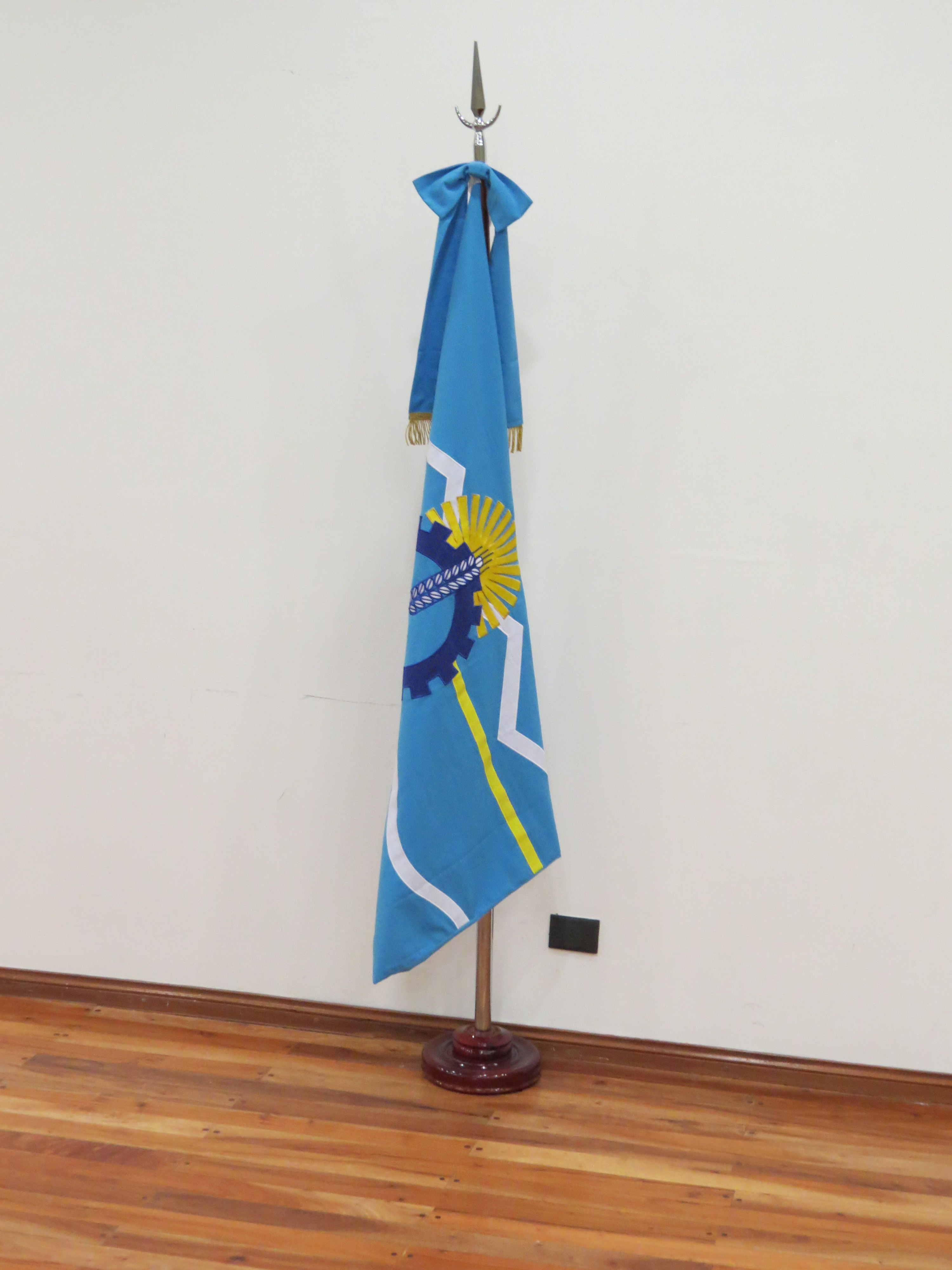 Bandera provincial en el edificio de la legislatura del Chubut, en Rawson